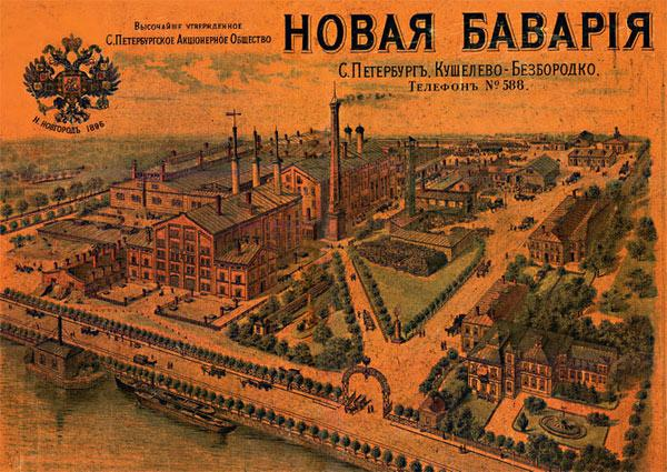 Пиво-медоваренный завод «Новая Бавария»